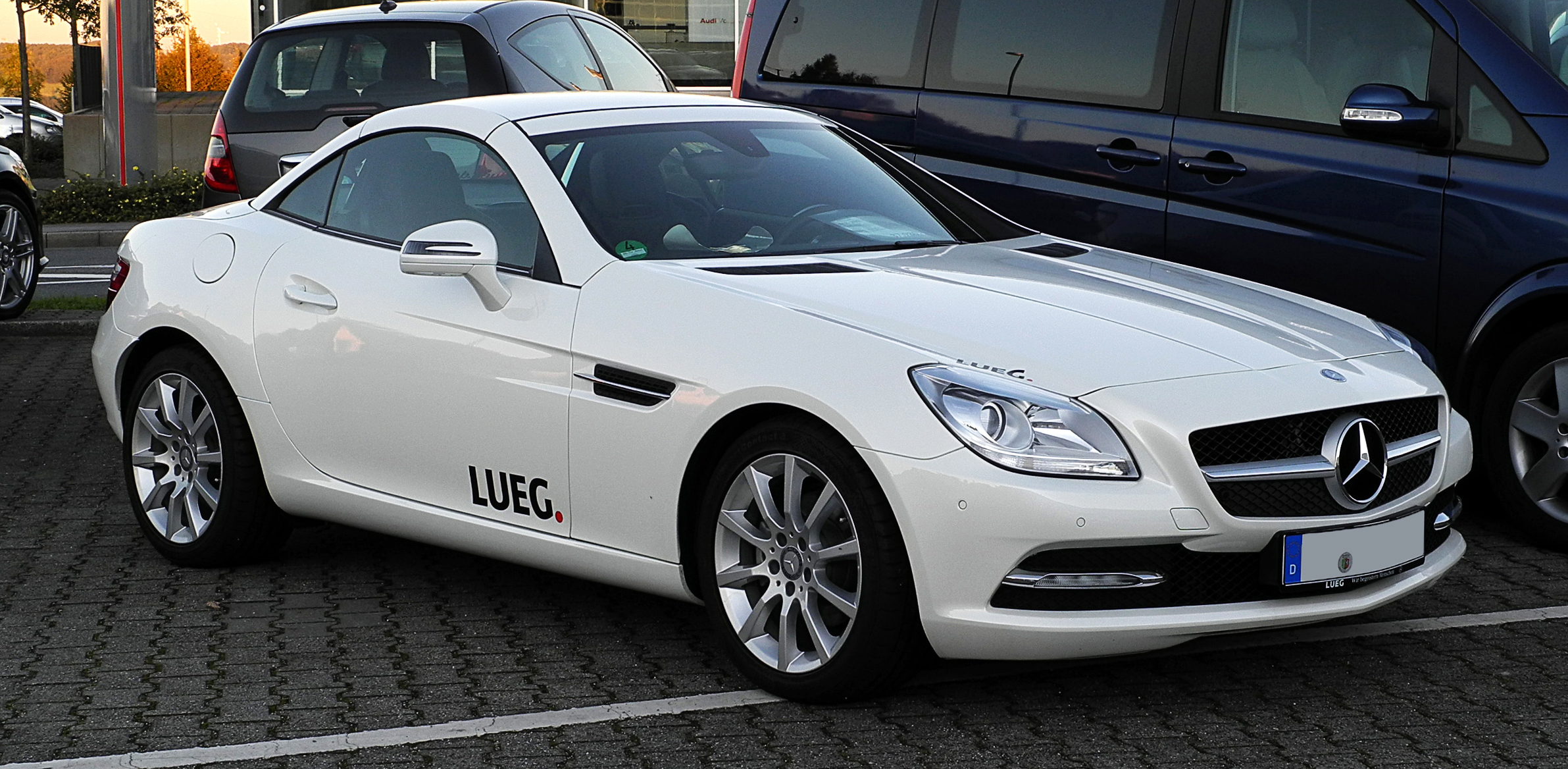 Mercedes-Benz SLK 200 BlueEFFICIENCY (R 172)